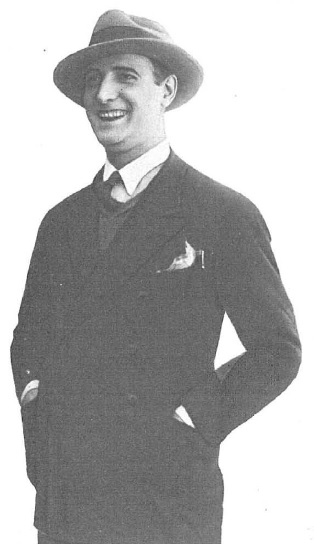 Fotografía del director de cine español Florián Rey publicada en 1927 con motivo del rodaje de su película La hermana San Sulpicio